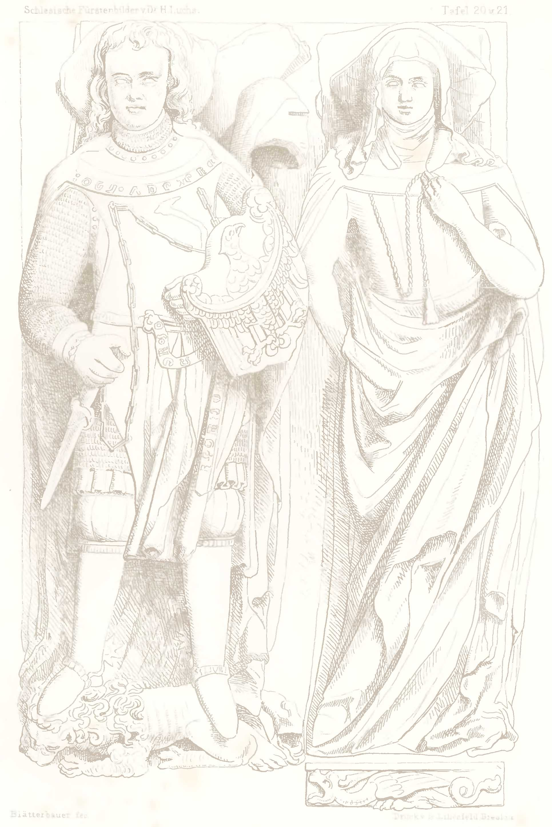 Guta i Bolko